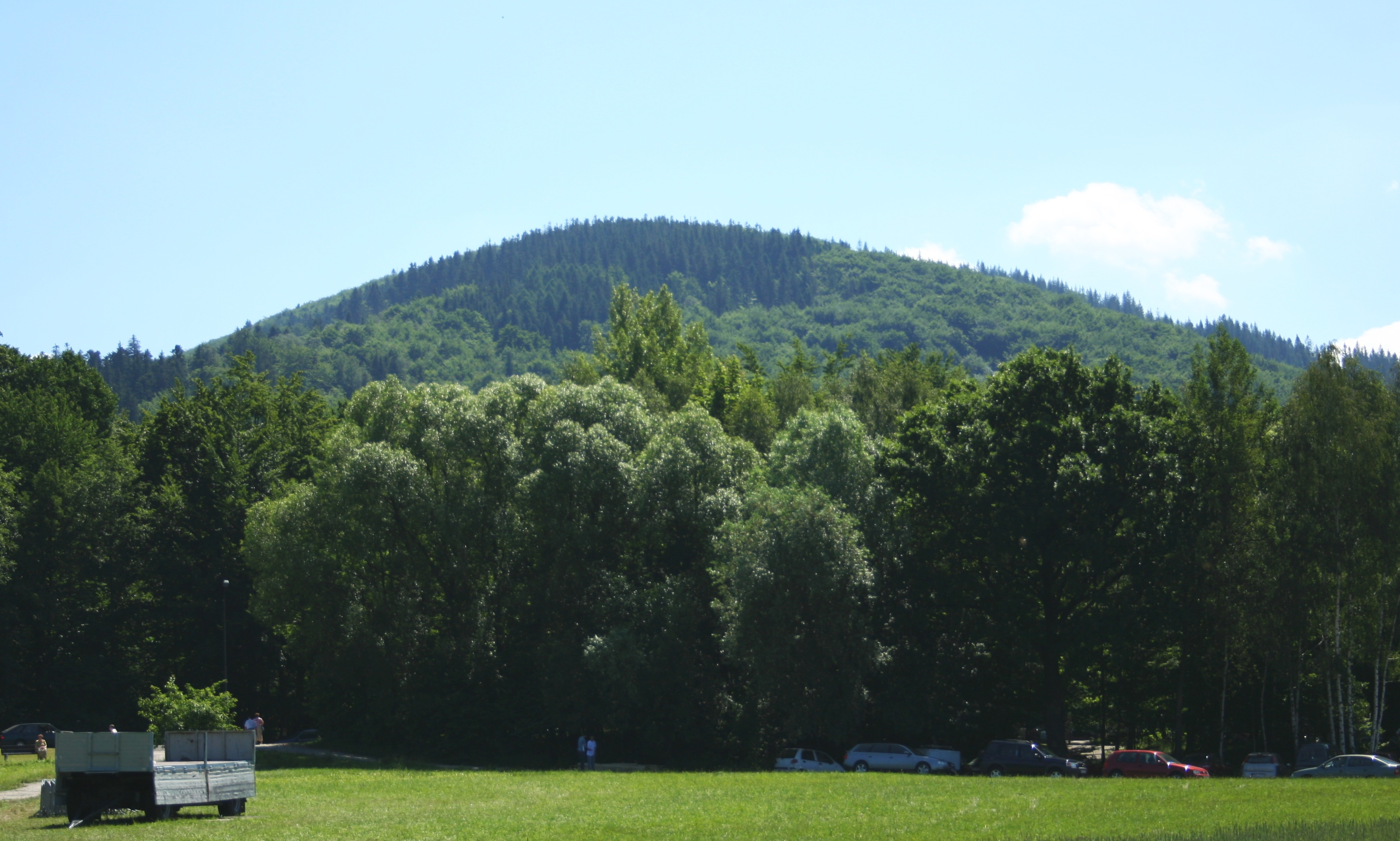 Równica, Beskid Śląski